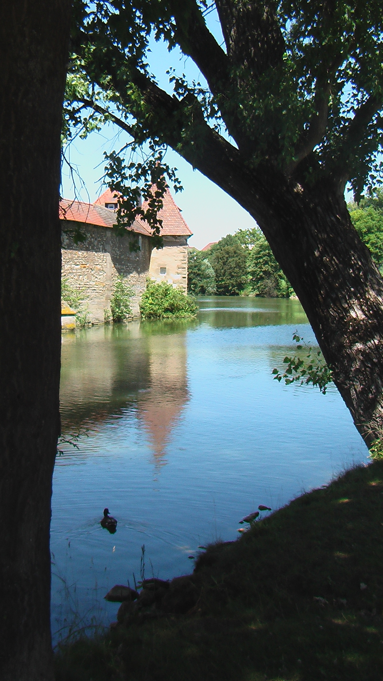 Weißenburg Ansicht